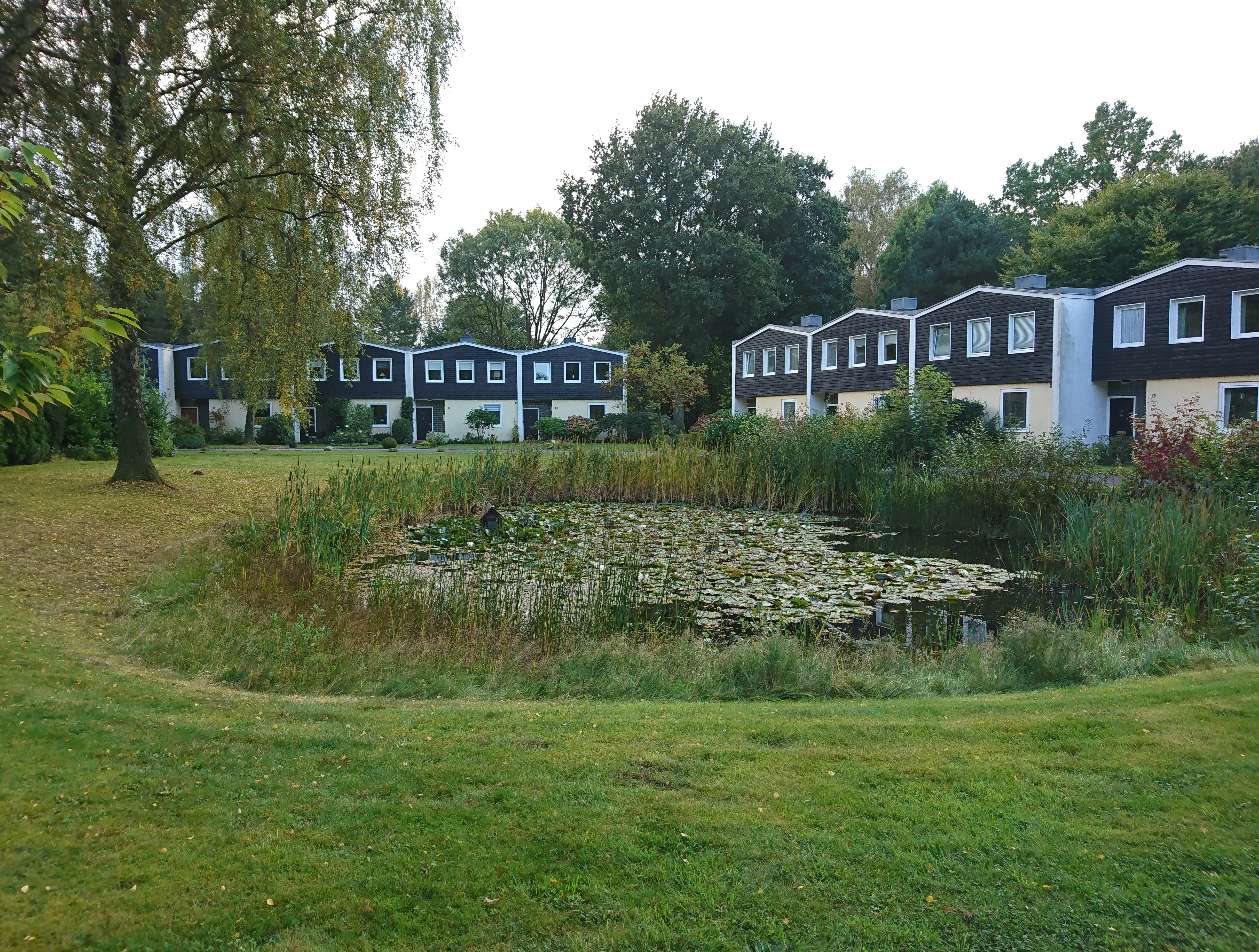 Kreuzfurth-Siedlung